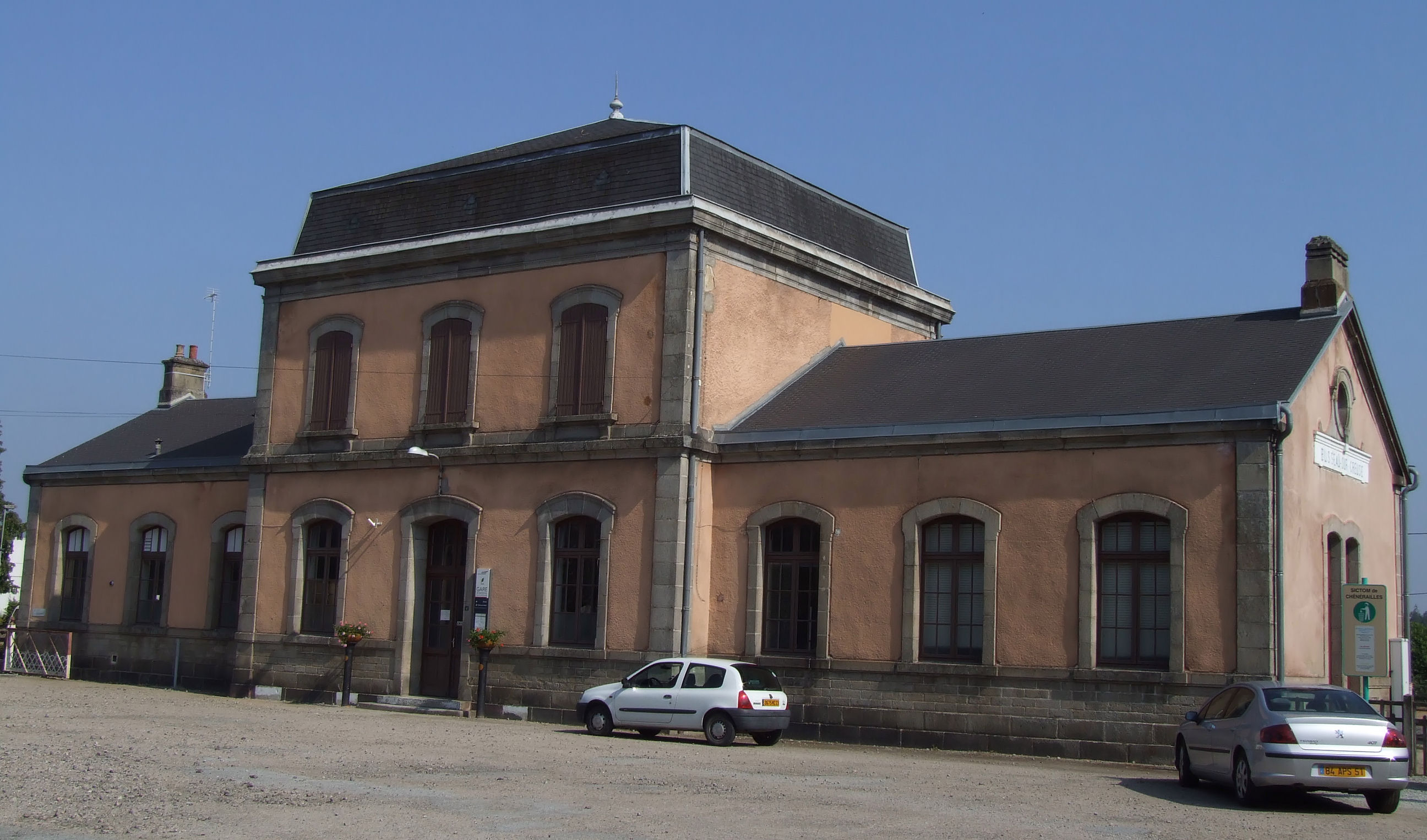 Gare de Busseau-sur-Creuse